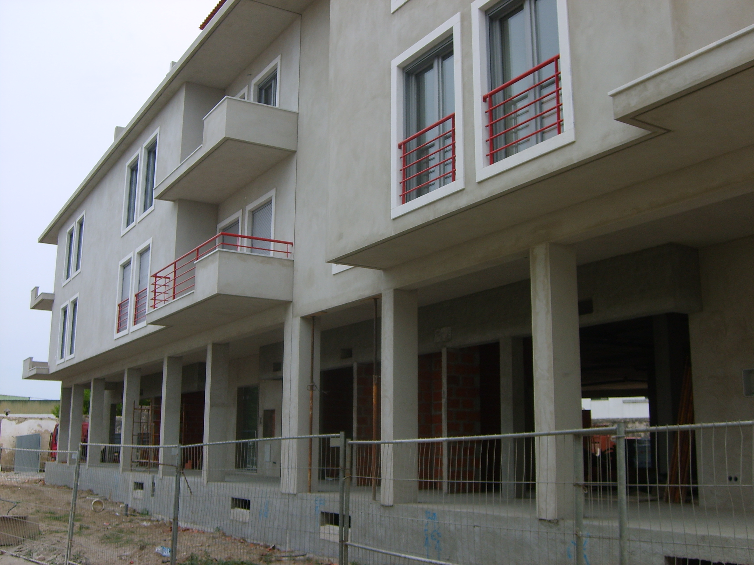 Nouveaux appartements construits à Lourinhã